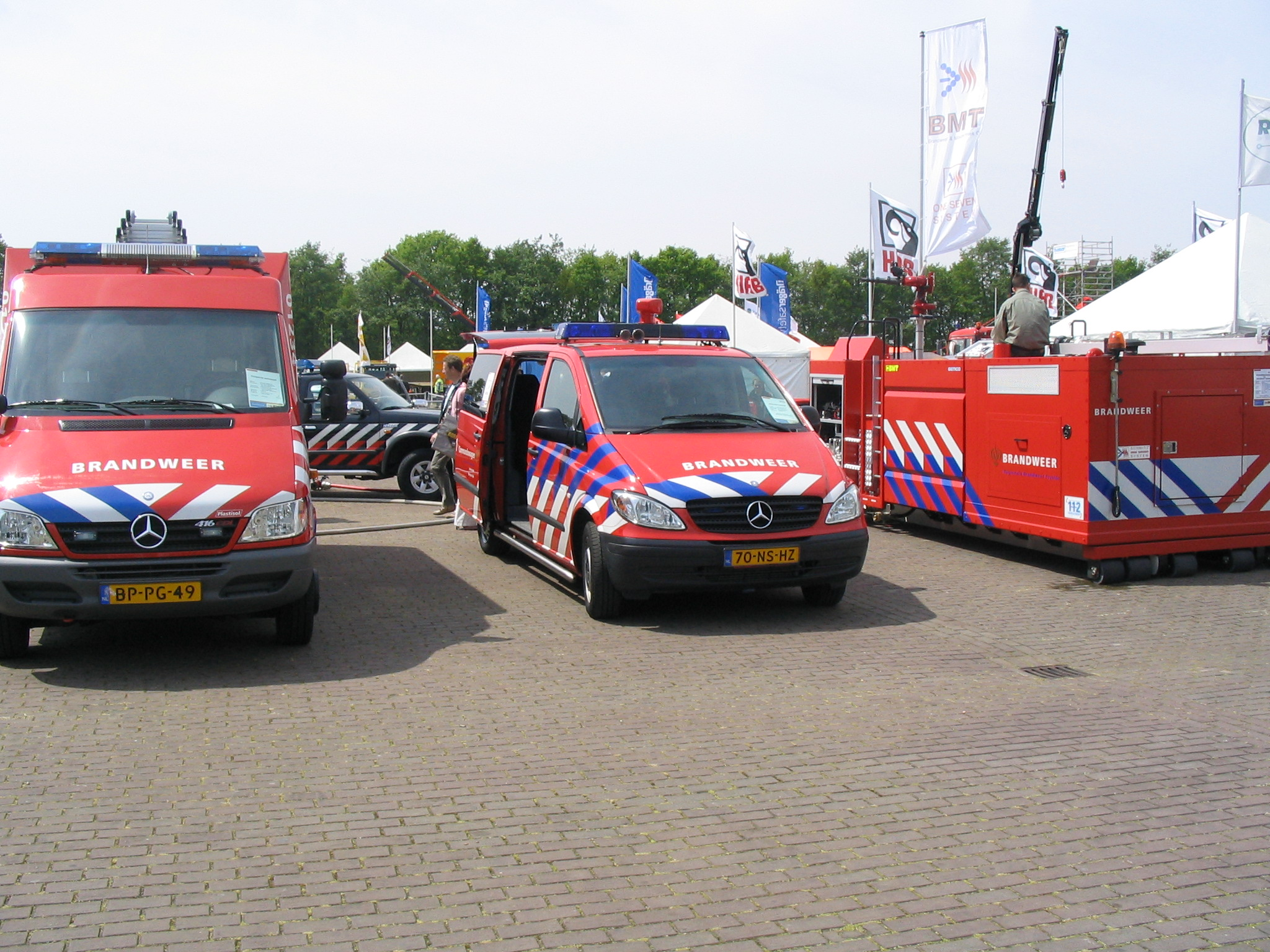 Eigen gemaakte foto